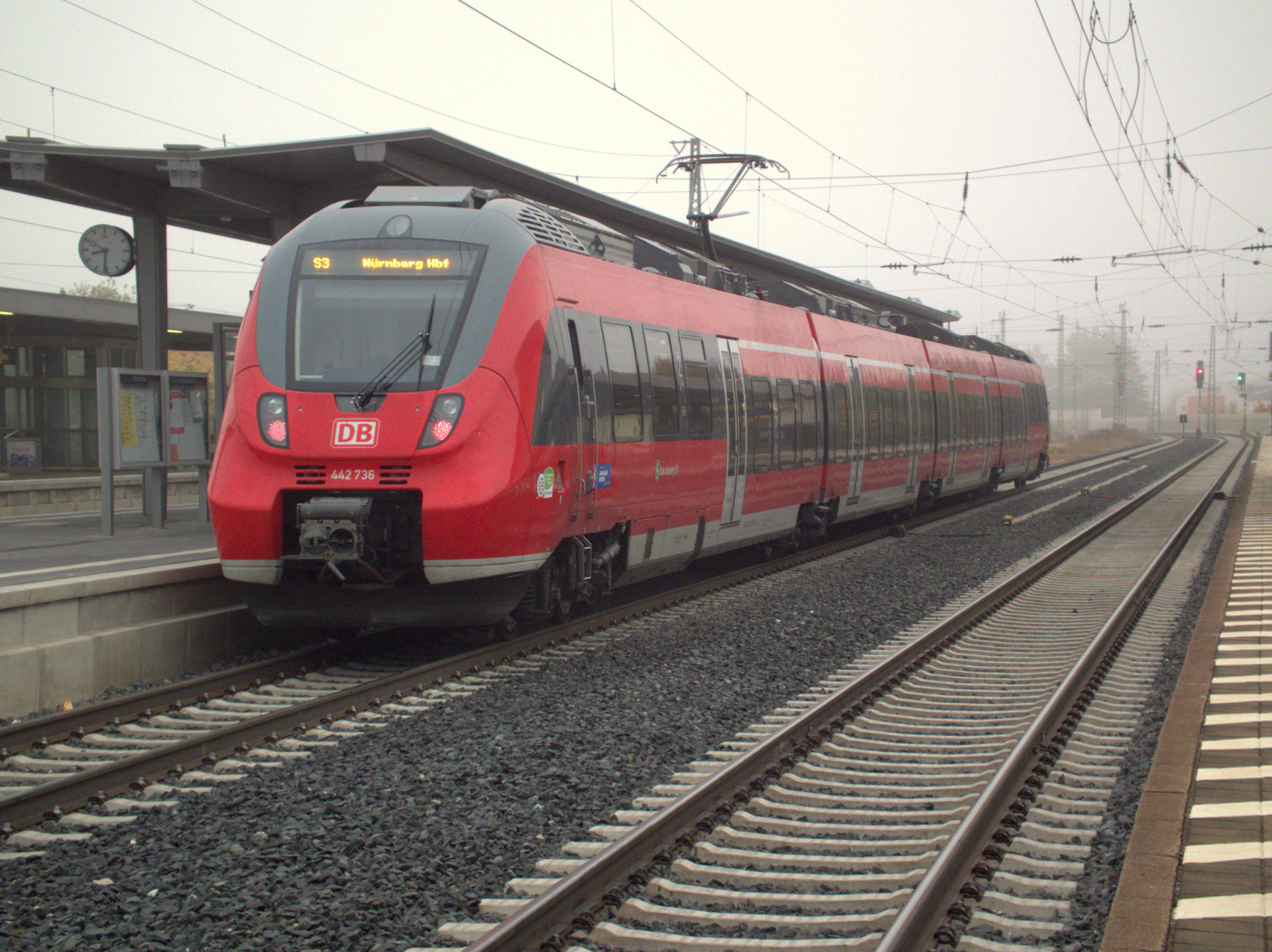 Bahnhof Neumarkt in der Oberpfalz: S-Bahn (S3) / Bomardier BR 442